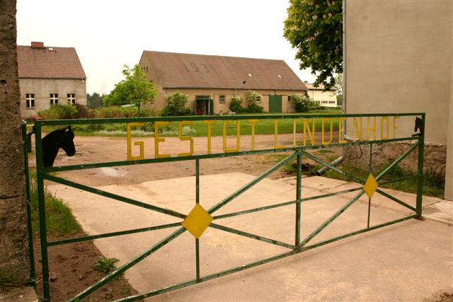 Blick über das Hoftor